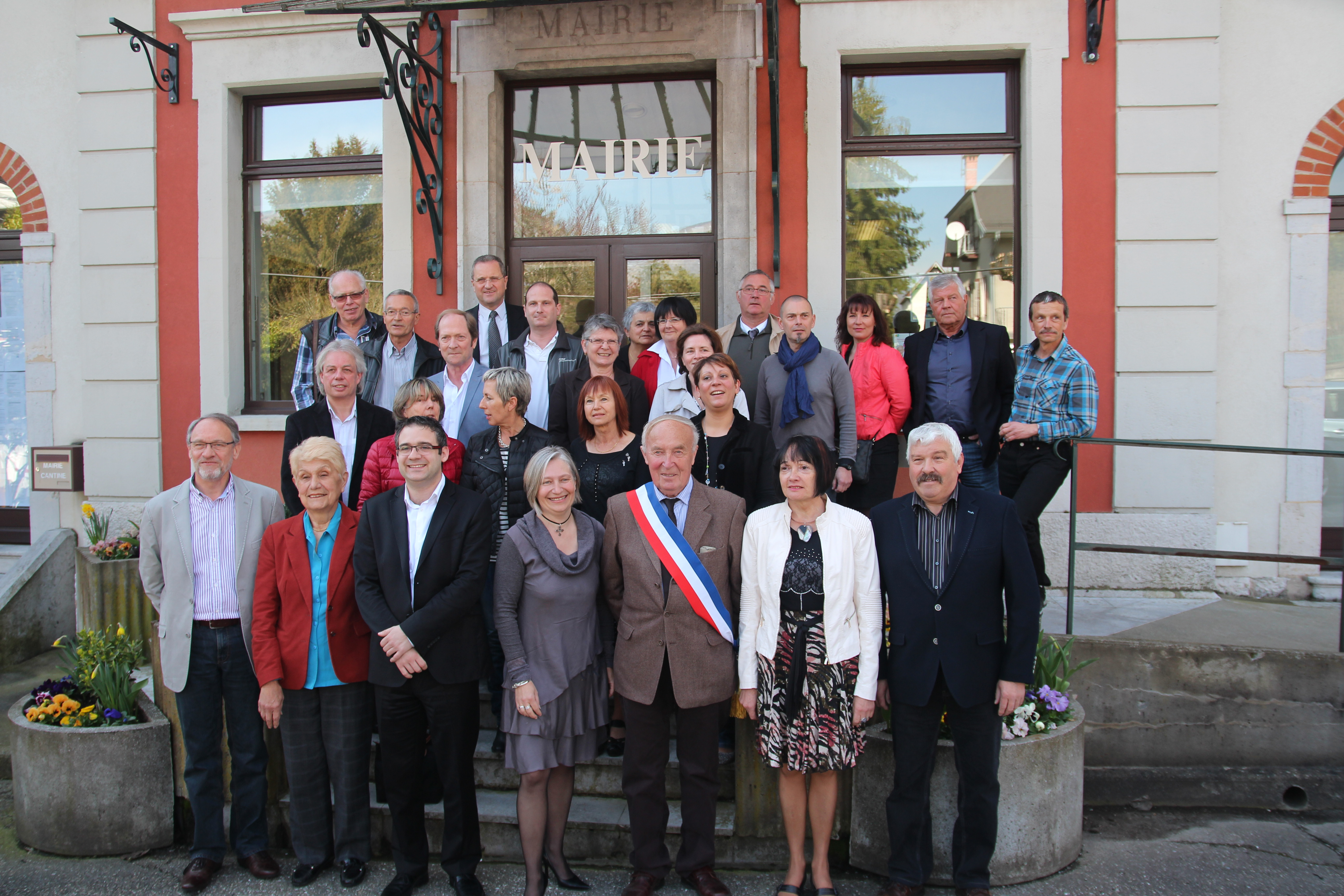 Les élus de la ville de Challes-les-Eaux en mars 2014. De bas en haut et de gauche à droite: 1er rang : Yves Thévenot, Jeanne Excoffon, Julien Donzel, Josette Rémy, Daniel Grosjean, Danièle D’Agostin, Claude Muller